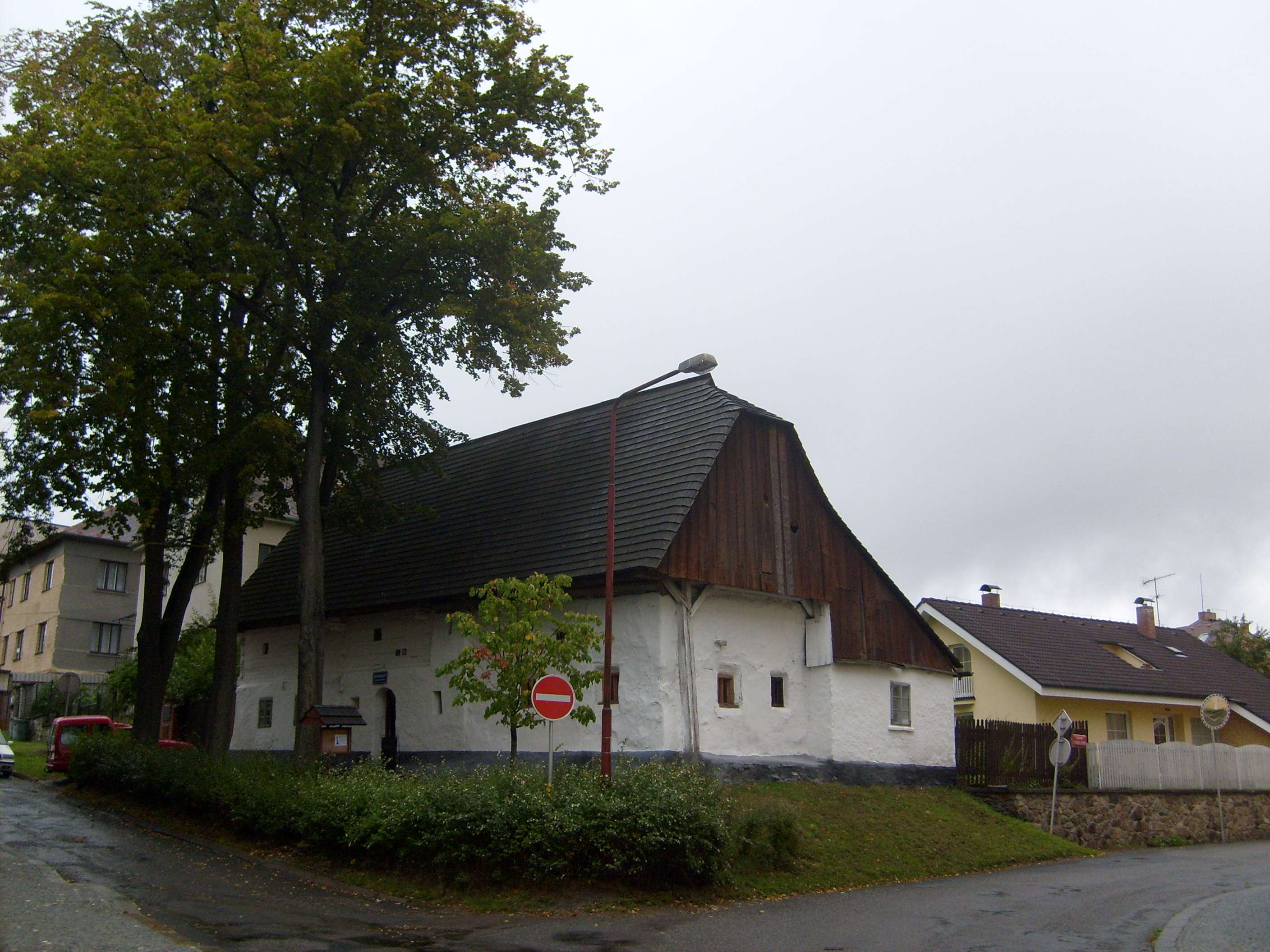 Štáflova chalupa, Havlíčkův Brod, Vysočina Region Czech Republic